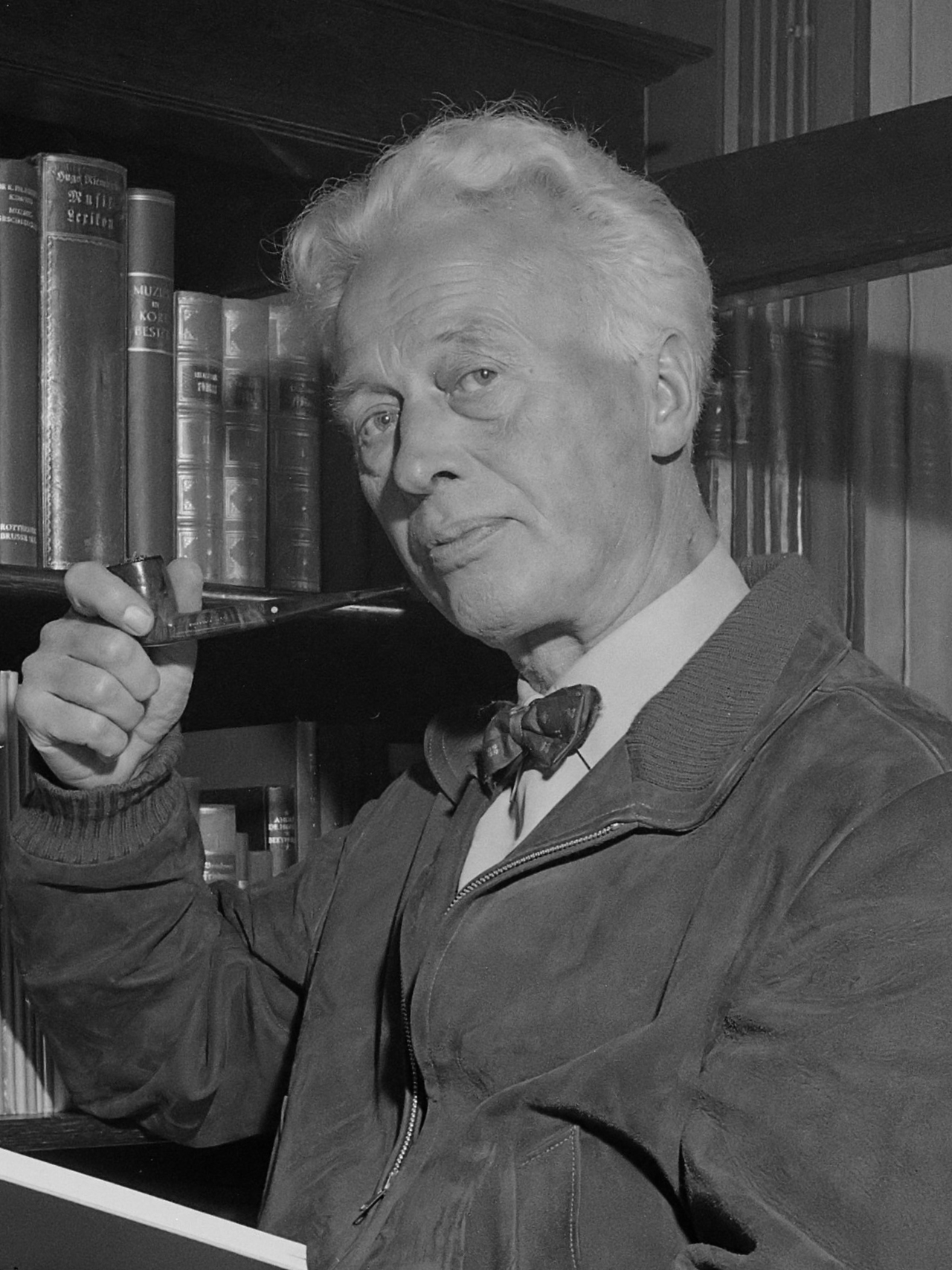 Willem Gehrels directeur Amsterdamse Volksmuziekschool 30 november 70 jaar 21 november 1955